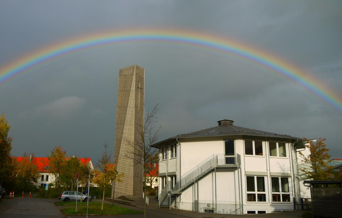 Evengelisch-Lutherische Christuskirche